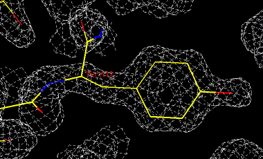 Schematisches Modell von Tyrosin. Zu sehen ist die Elektronendichte in weiß und das eingepasste Molekülmodell von Tyrosin in Farbe.